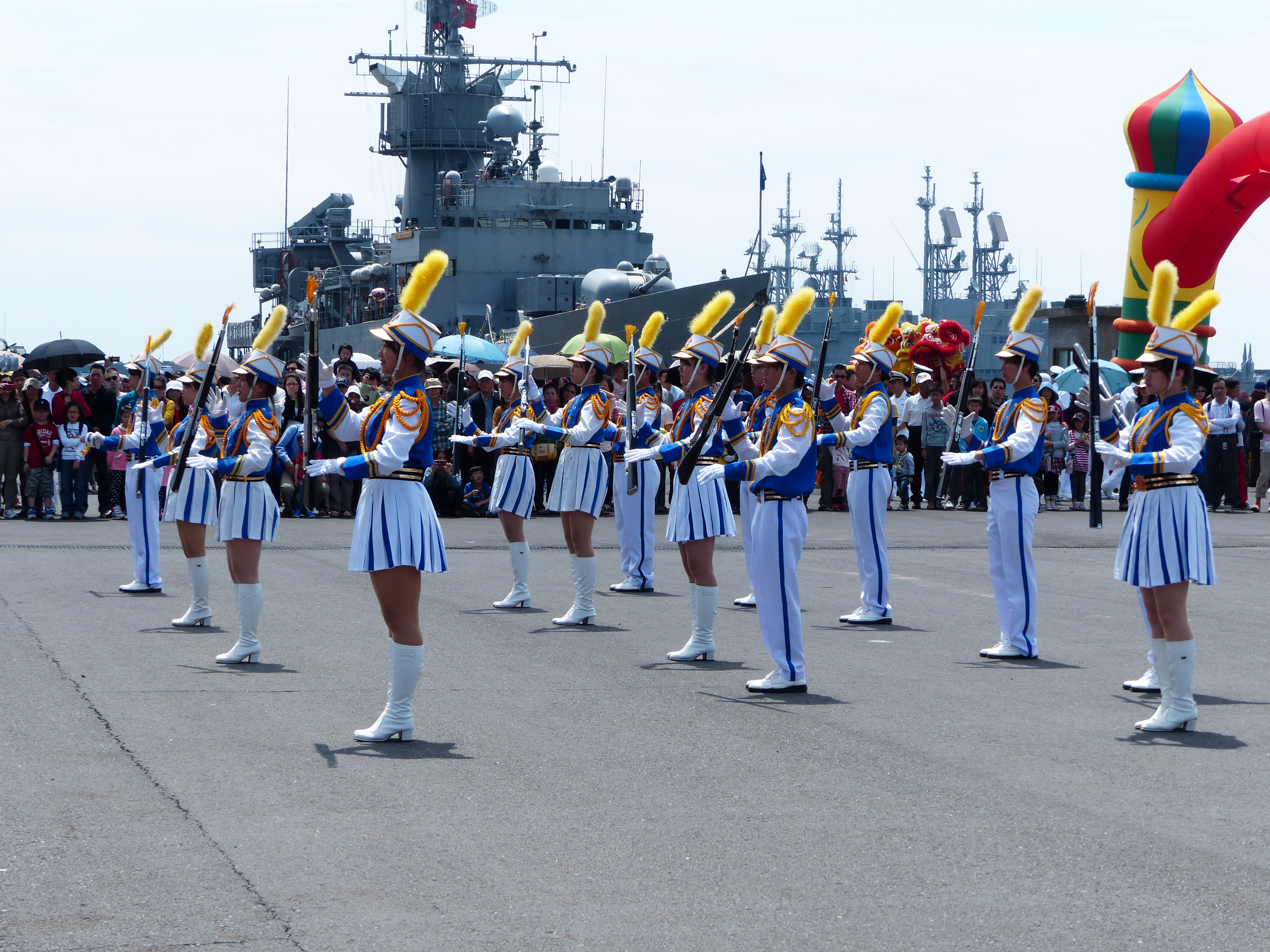 2013年中正軍港營區開放活動，13號碼頭表演中的宜蘭高商儀隊。